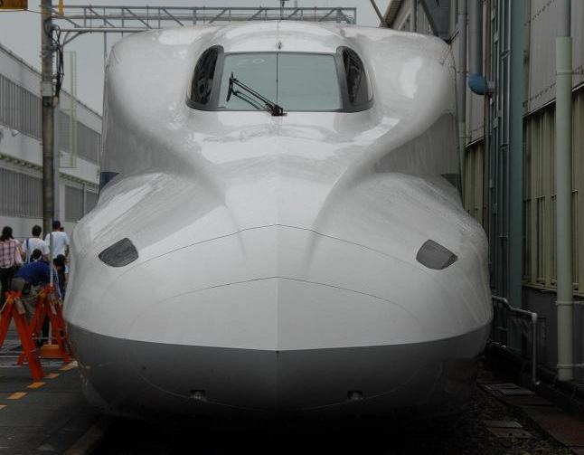 新幹線N700系の先頭車（正面）, 新幹線なるほど発見デーにて